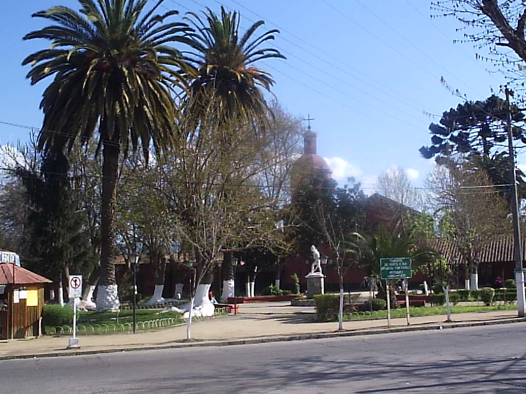 Plaza de Armas de El Monte (Región Metropolitana - Chile)